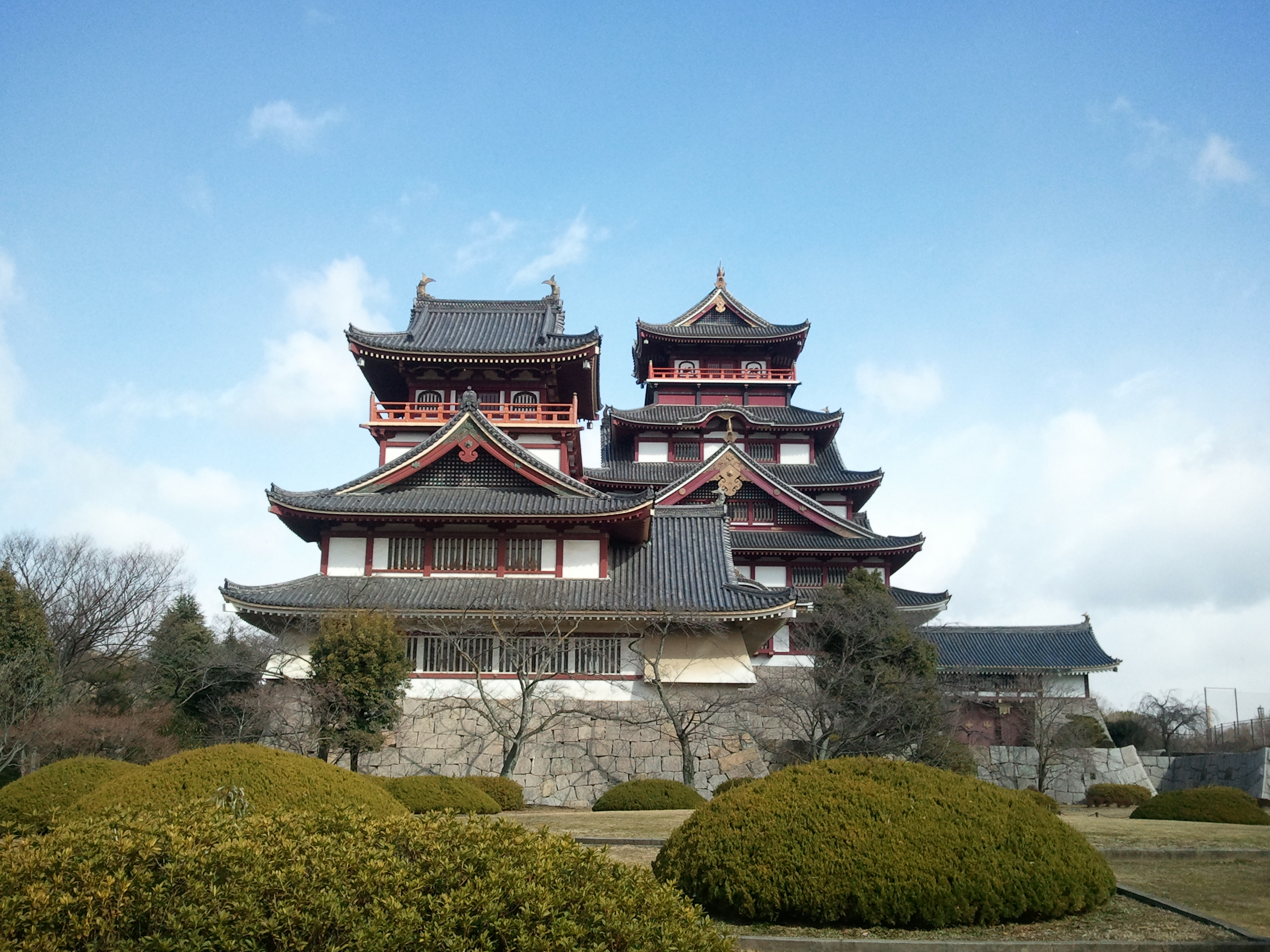 伏見桃山城